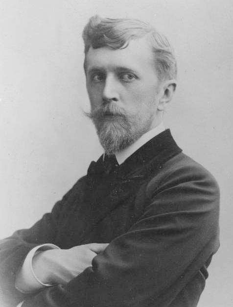 Фердынанд Рушчыц Portrait of Ferdynand Ruszczyc